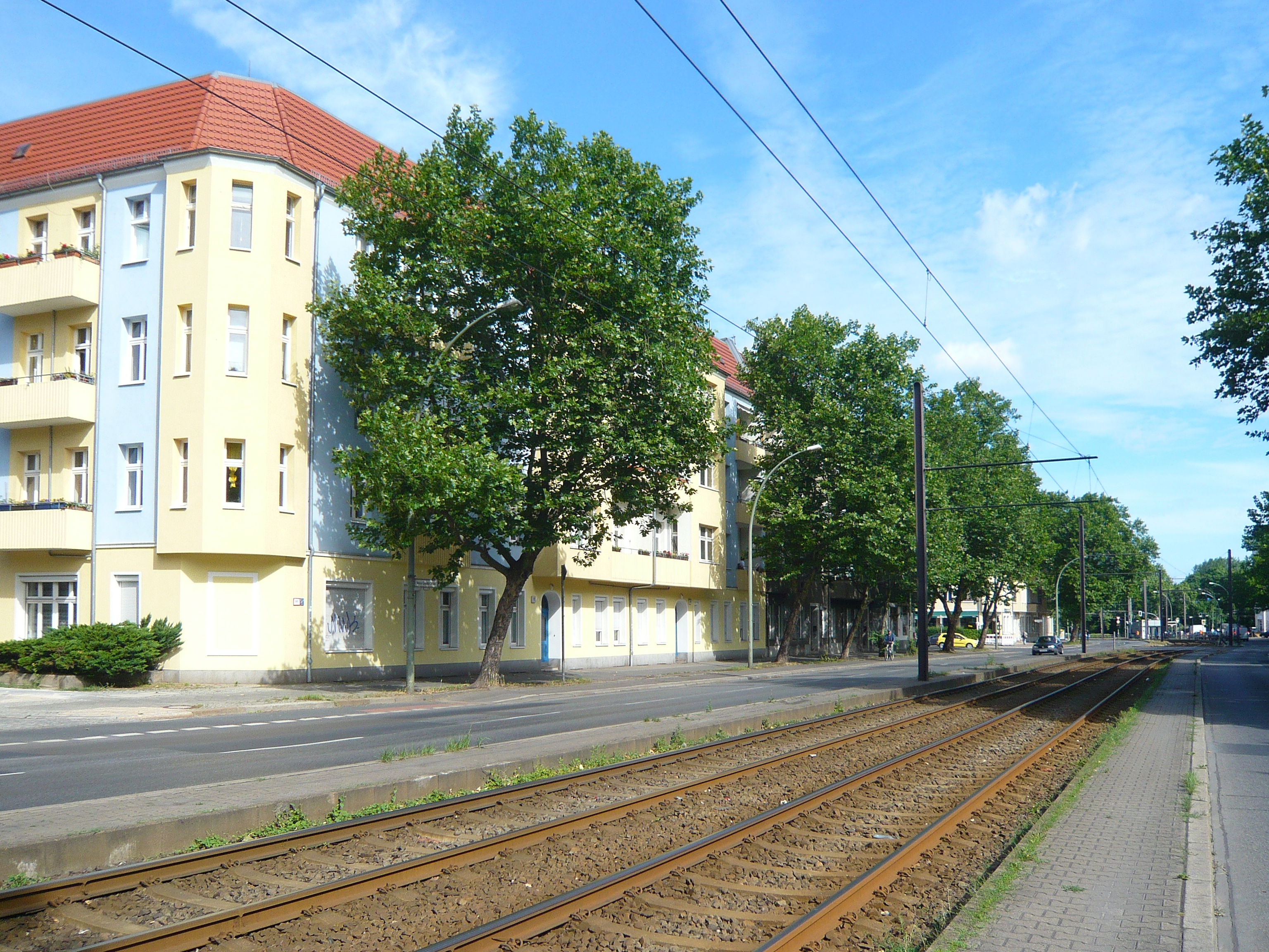 Weißensee, Indira-Gandhi-Straße, Blick nordwärts zur Berliner Allee